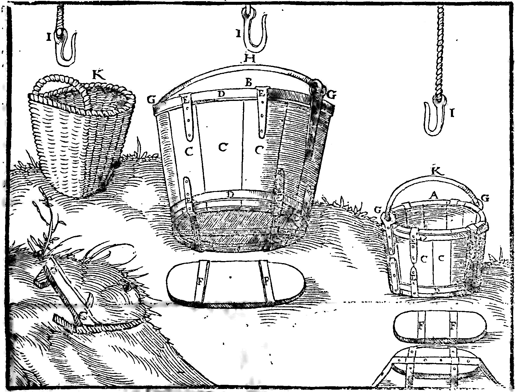 Incisione da De re metallica di Georg Agricola, Basilea, 1556